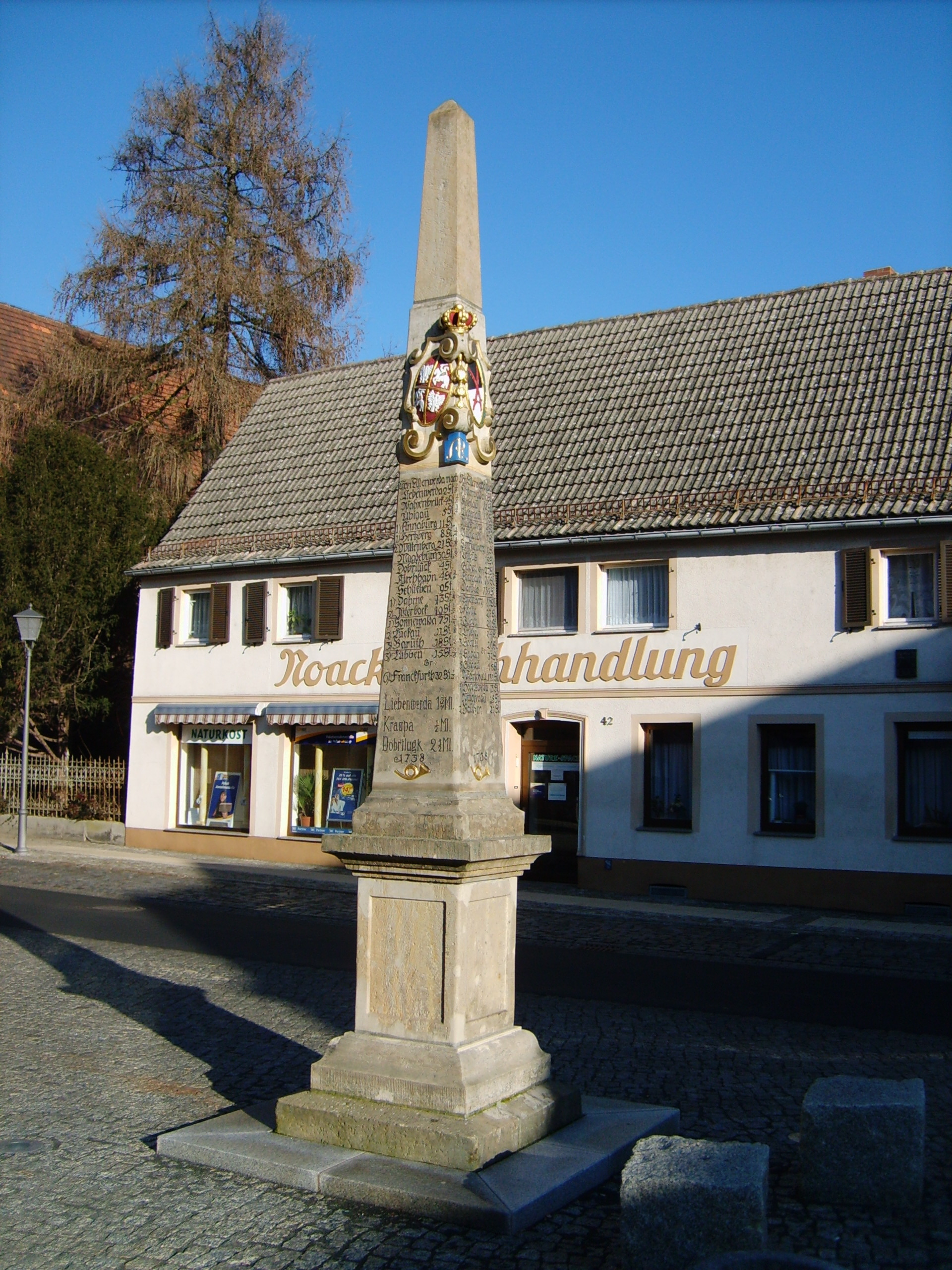 Die Postsäule in Elsterwerda